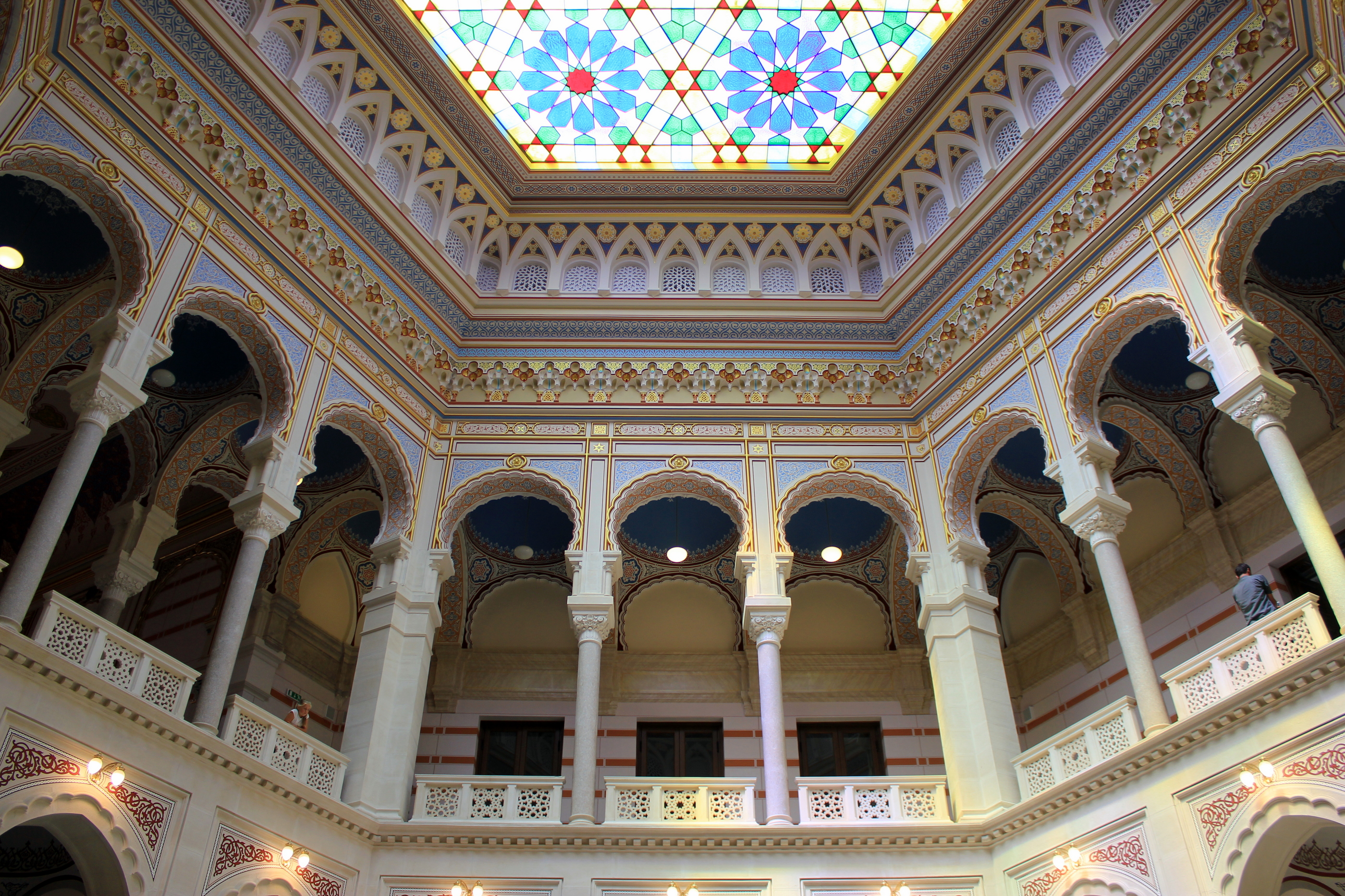 Innenansicht der sanierten Vijećnica in Sarajevo.